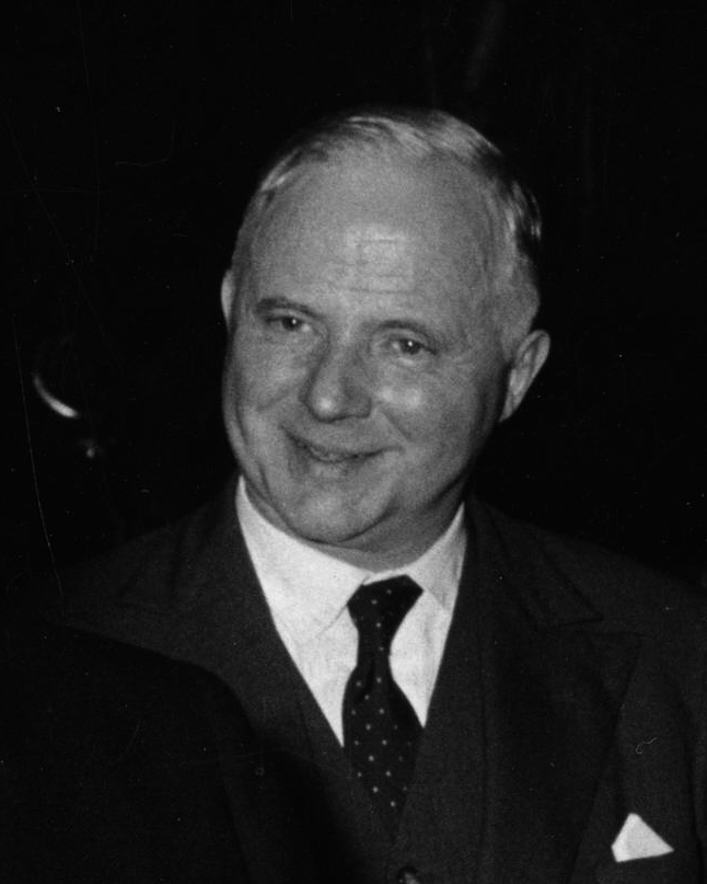 7. CDU-Bundesparteitag, 12.05.1957 - 15.05.1957